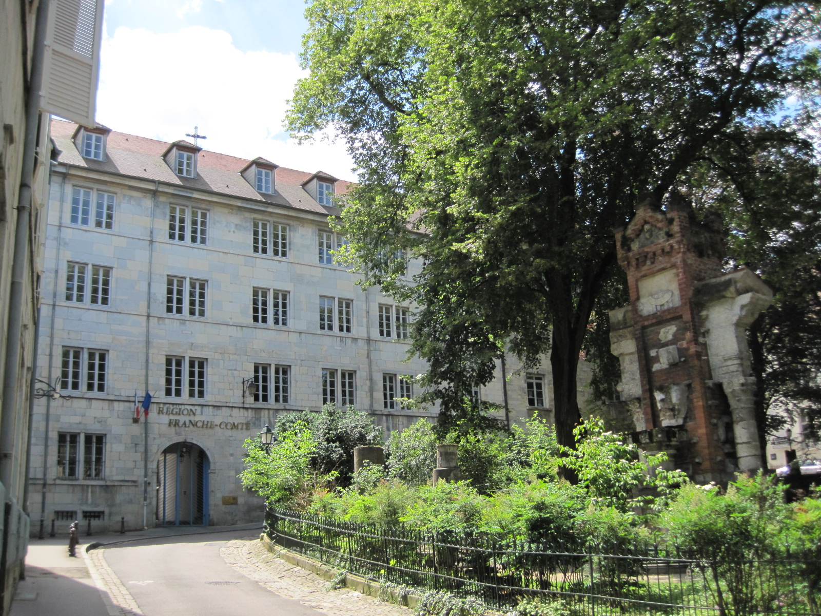 Conseil Régional de Franche-Comté - Square Castan - Besançon - Franche-Comté